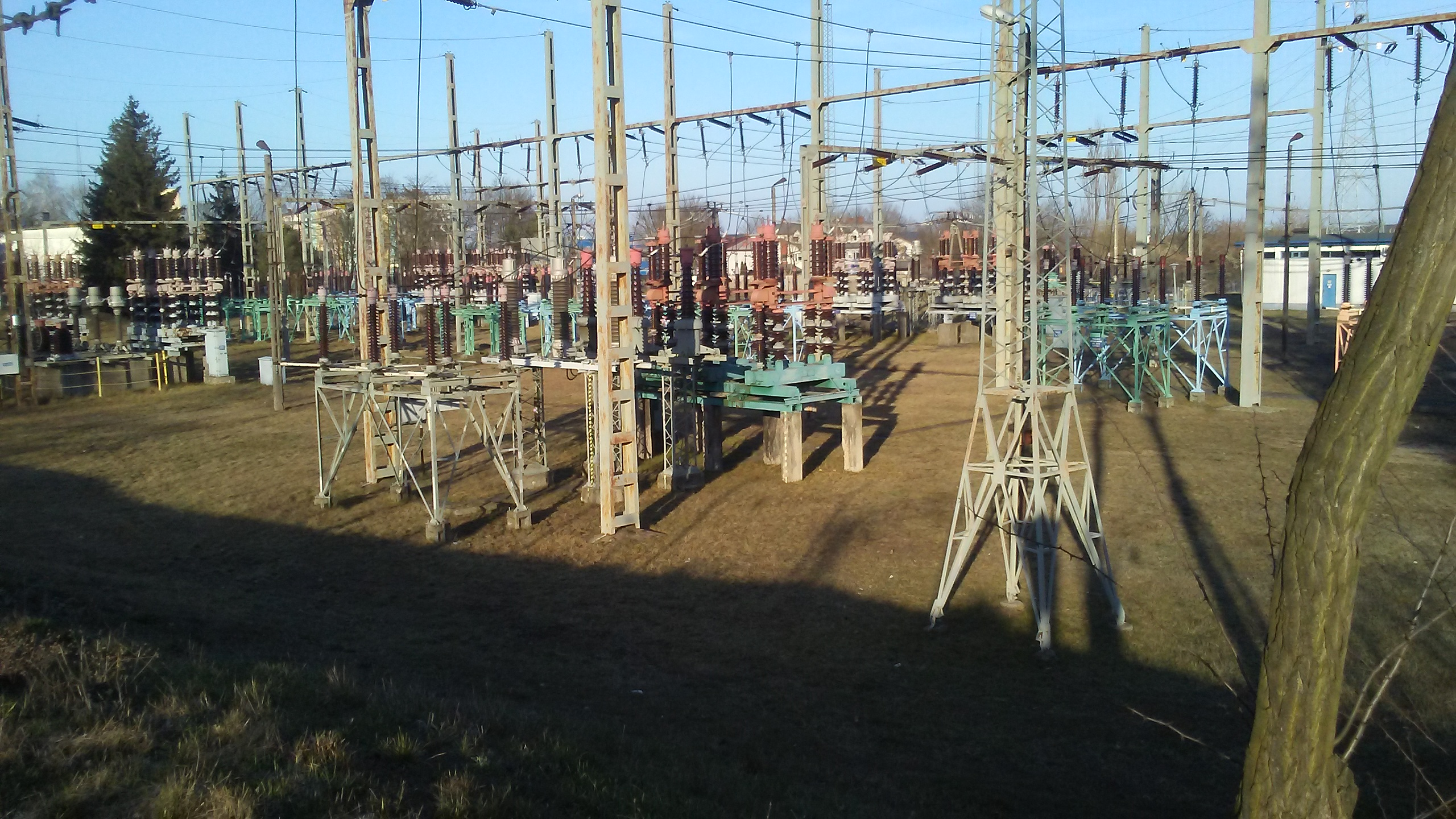 PGE, Batalionów Chłopskich, Tomaszów Mazowiecki